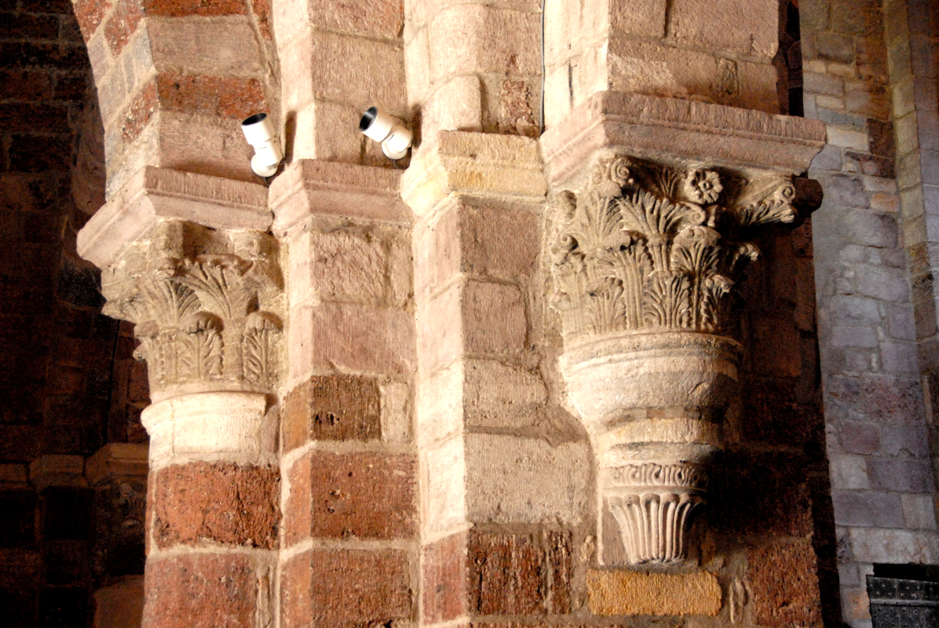 St.-Julien Brioude, Kapitelle Narthexpfeiler